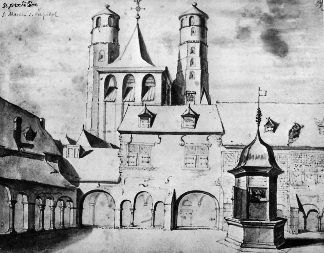 St. Maria im Kapitol, Köln. Justus Finkenbaum um 1665. Die Ansicht zeigt den Kreuzgang und die Stiftskirche aus westlicher Sicht. Das Blatt wurde irrtümlich mit dem Titel „s. pantalion“ beschriftet.